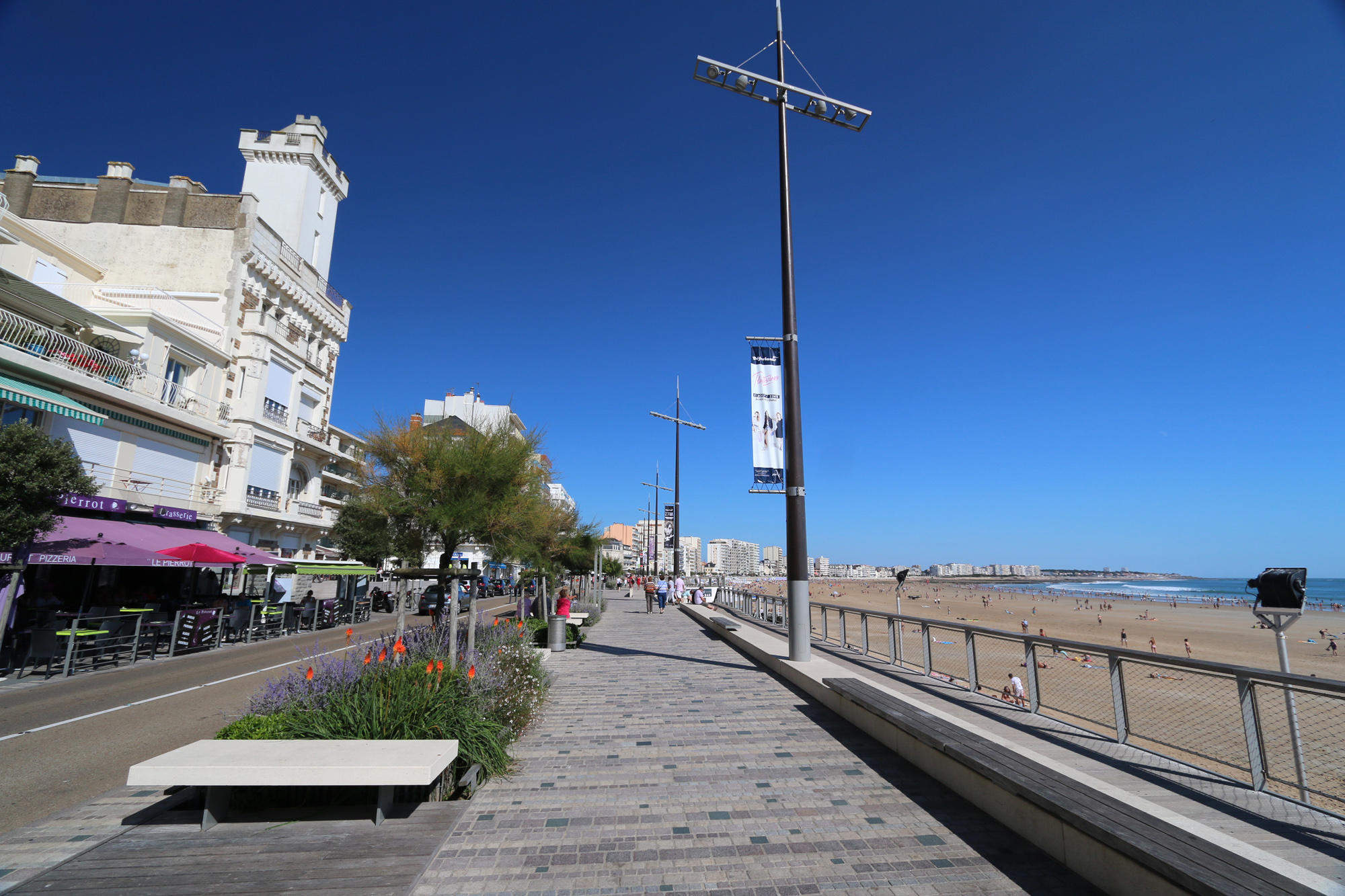 Promenade de l'Amiral Lafargue, Sables d'Olonne